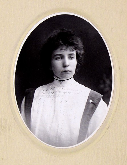 Julija Pranaitytė around 1896